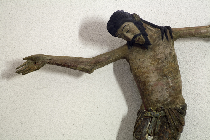 Formiguères (Pyrénées-Orientales, France), église Ste Marie, Christ-en-Croix de la 2e moitié du 12e siècle, en bois peint, provenant d'une descente de croix.